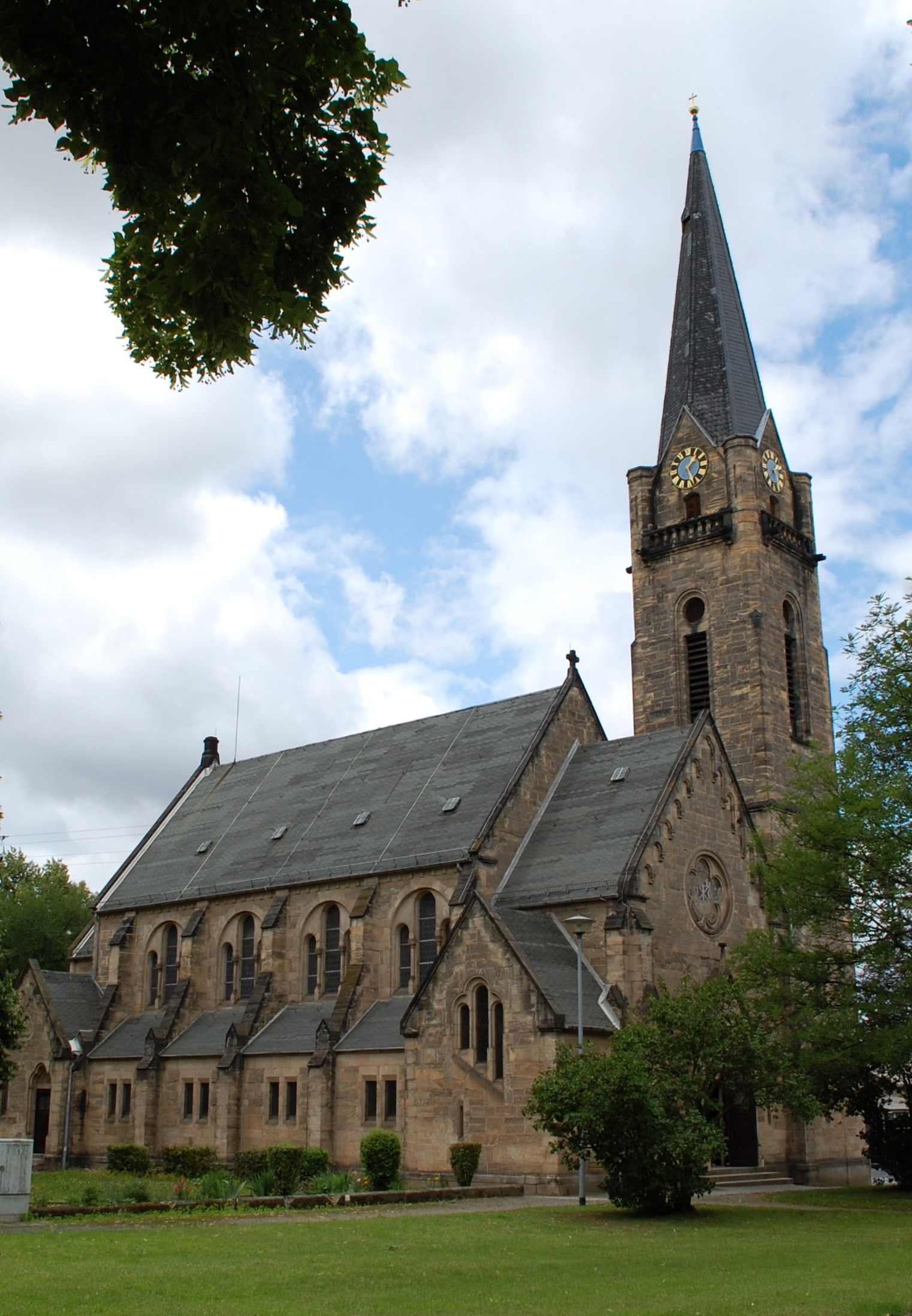 Sankt-Johannis-Kirche (Quedlinburg)